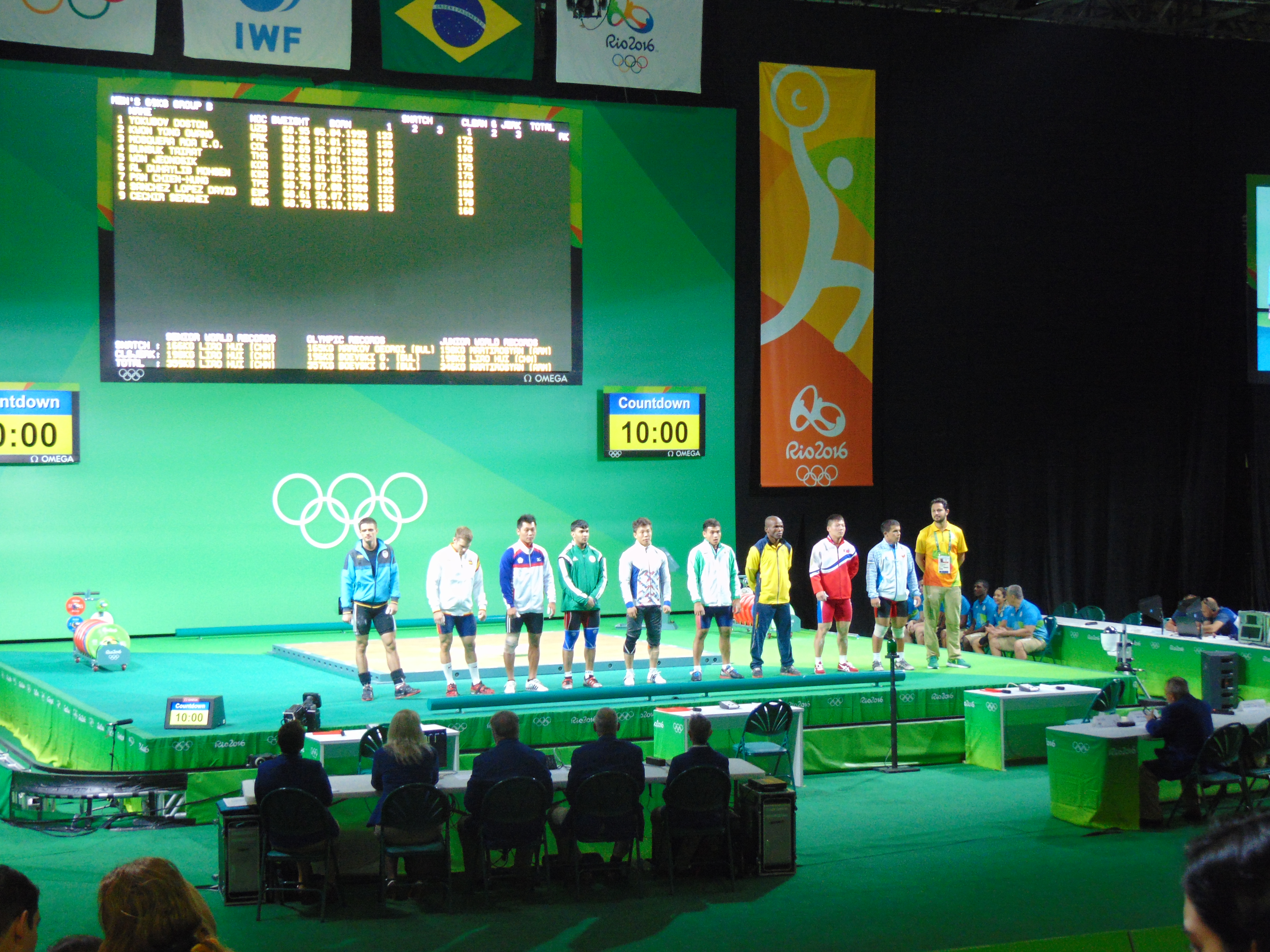 Rio 2016 - Weightlifting men's 69 kg